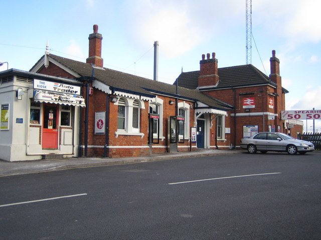 Luton